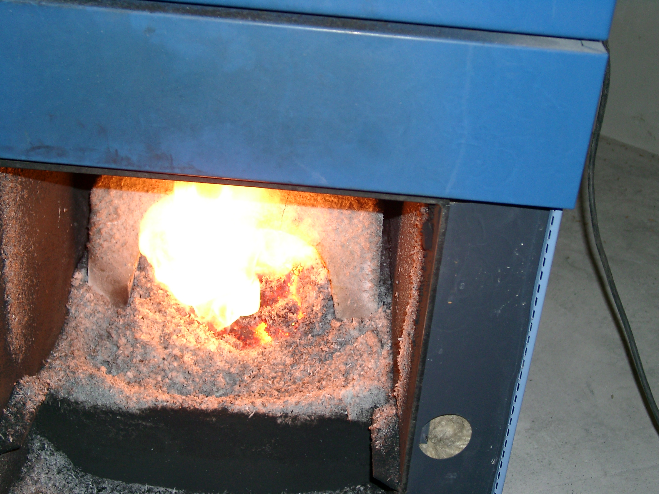 Feuer einer Getreideheizung, hier mit Hafer betrieben, deutlich zu erkennen die lockere, unverschlackte Asche